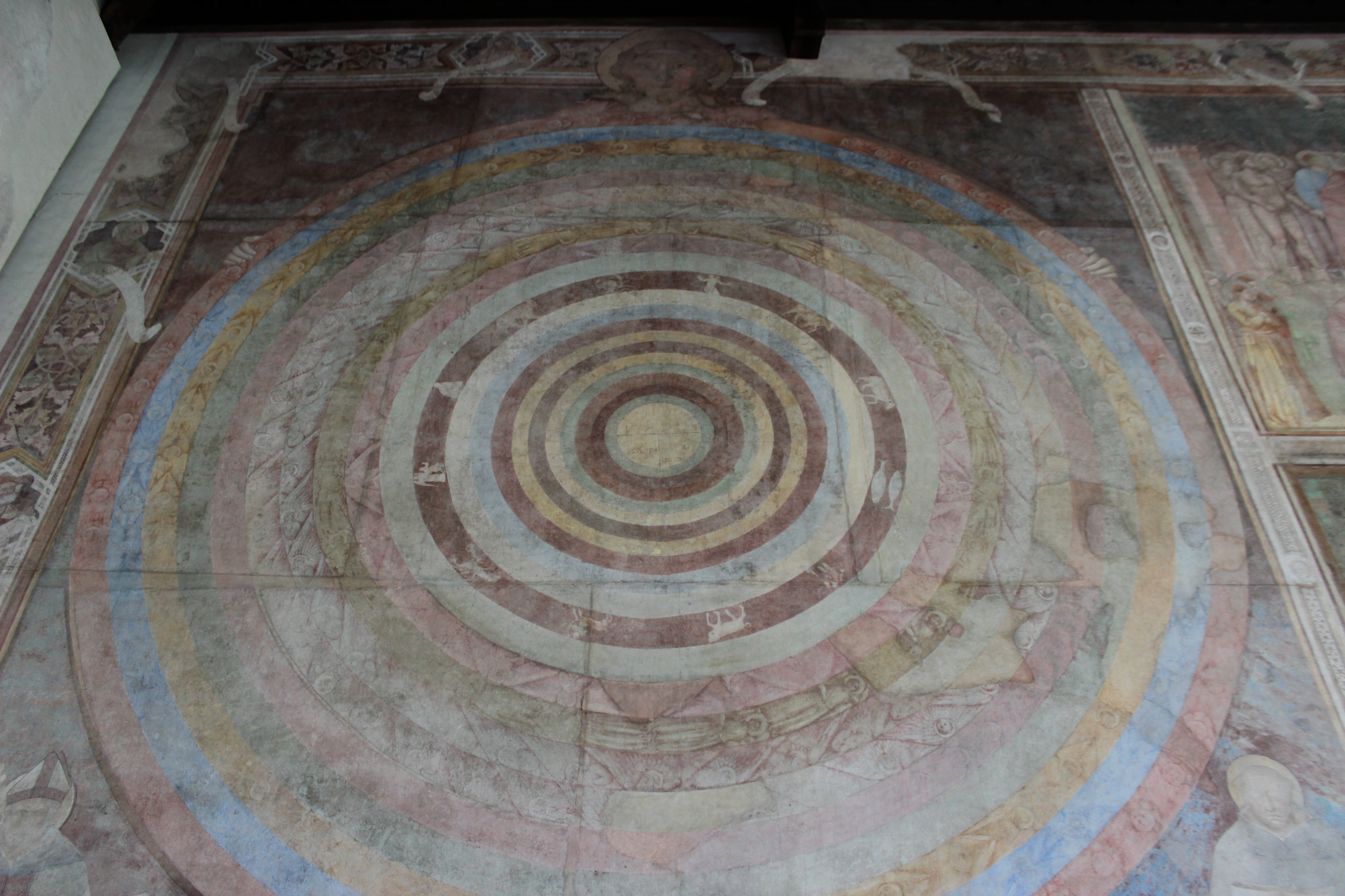 Camposanto de Pisa, frescos de Piero di Puccio.